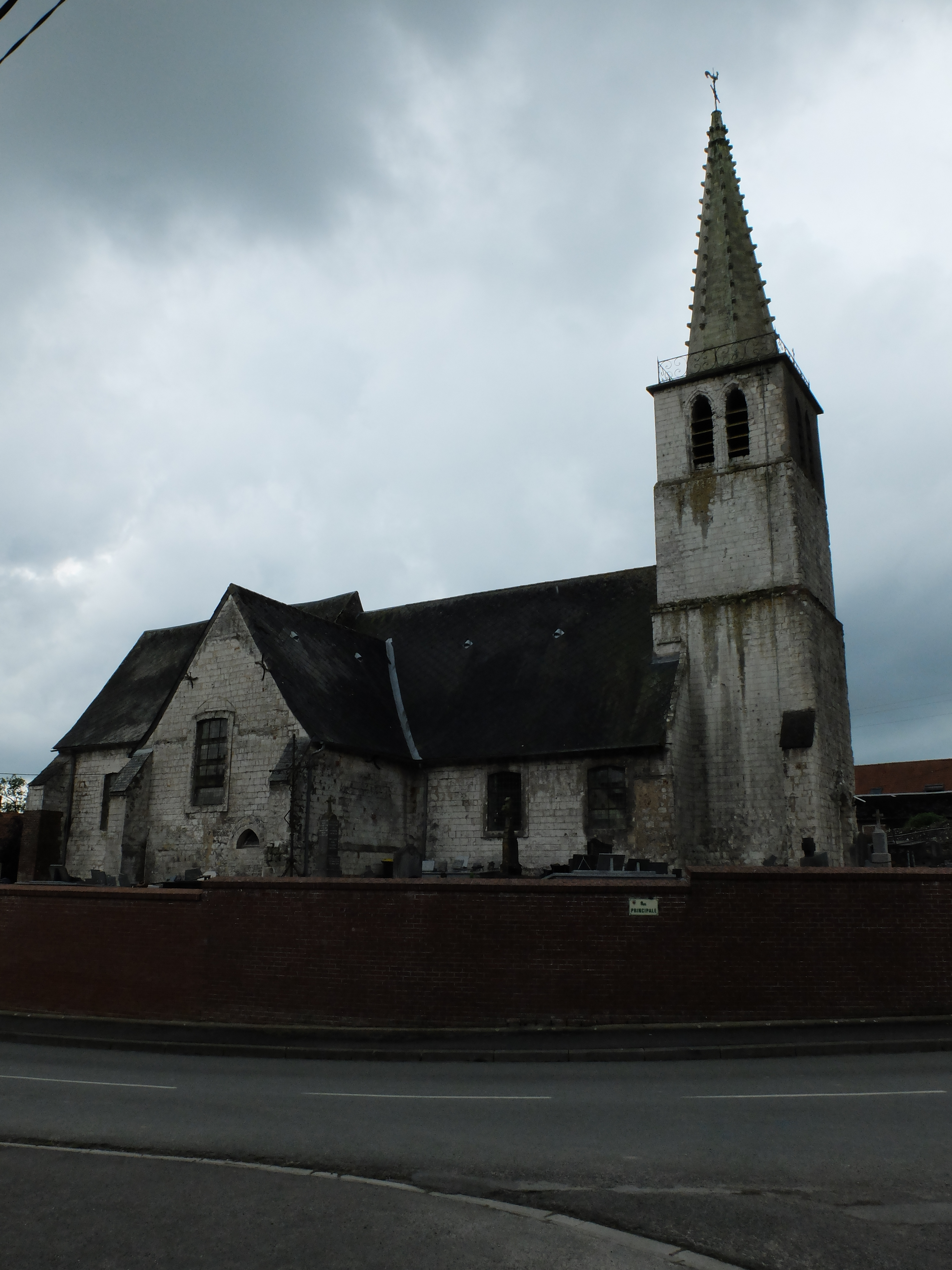 Vue de l'église Saint-Martin de Seninghem.